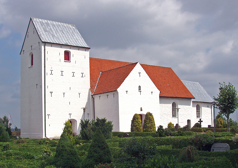 Hørning Kirke - Kirken set fra sydvest Hørning Sogn, Hjelmslev Herred, Skanderborg Amt / Århus Amt.